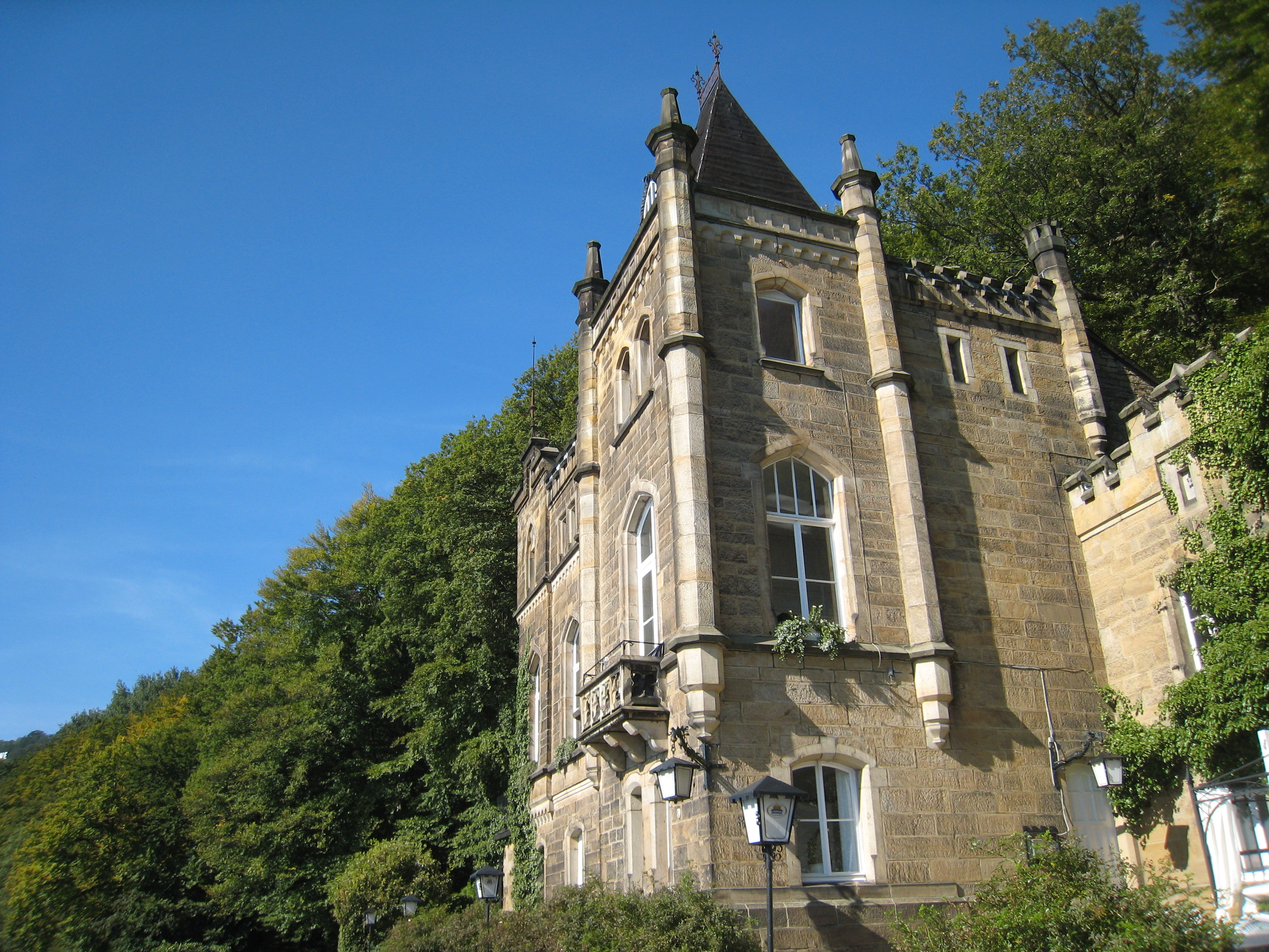 Die Villa Funke (Funkenburg) am Hengsteysee, Herdecke